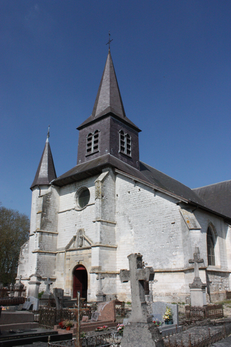 Église Saint-André de Sompuis (Classé) .